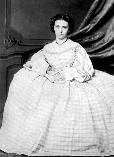 Portrait of Caroline von Gomperz-Bettelheim (1845-1925)